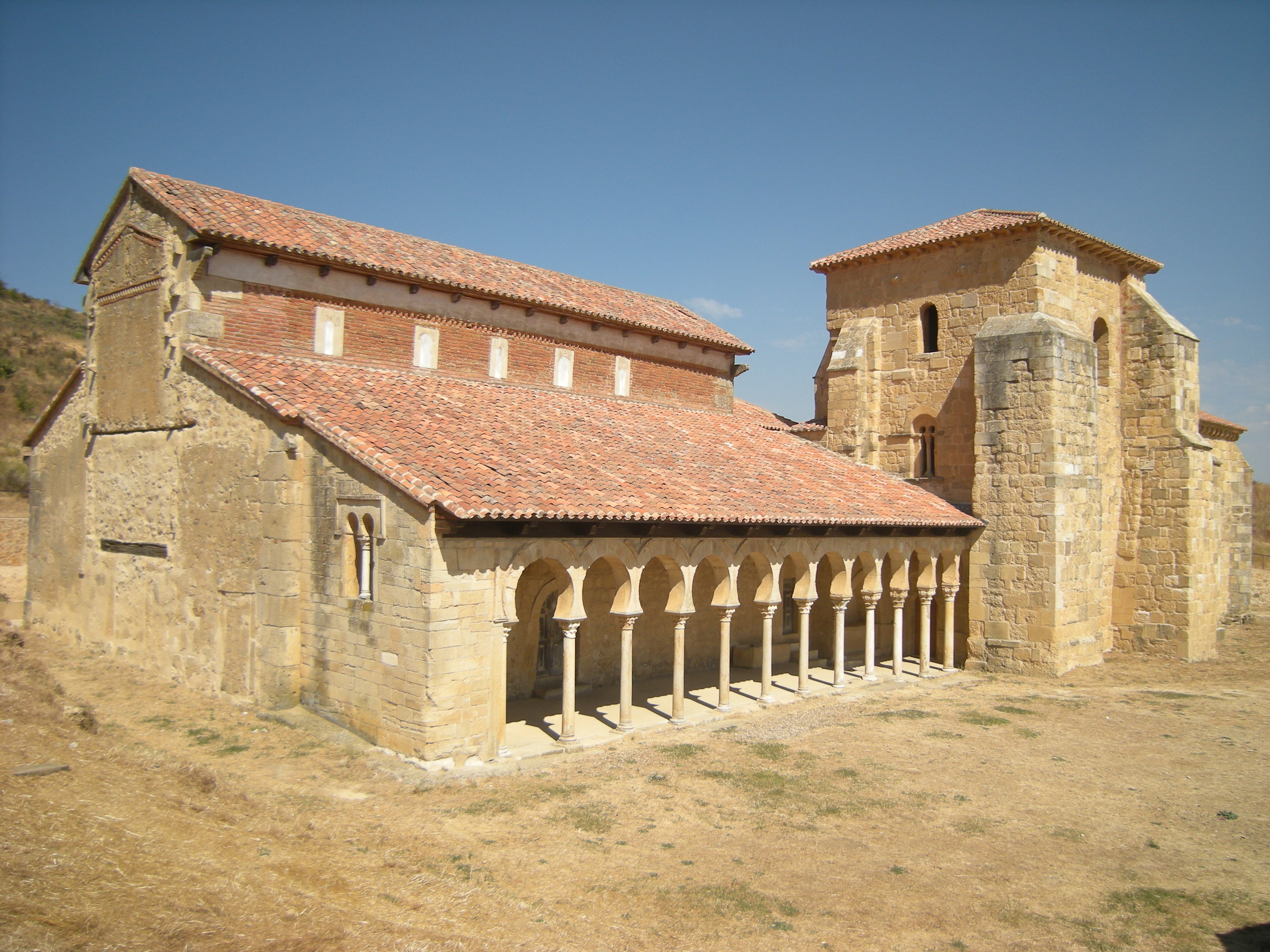 Alzado suroeste del conjunto.